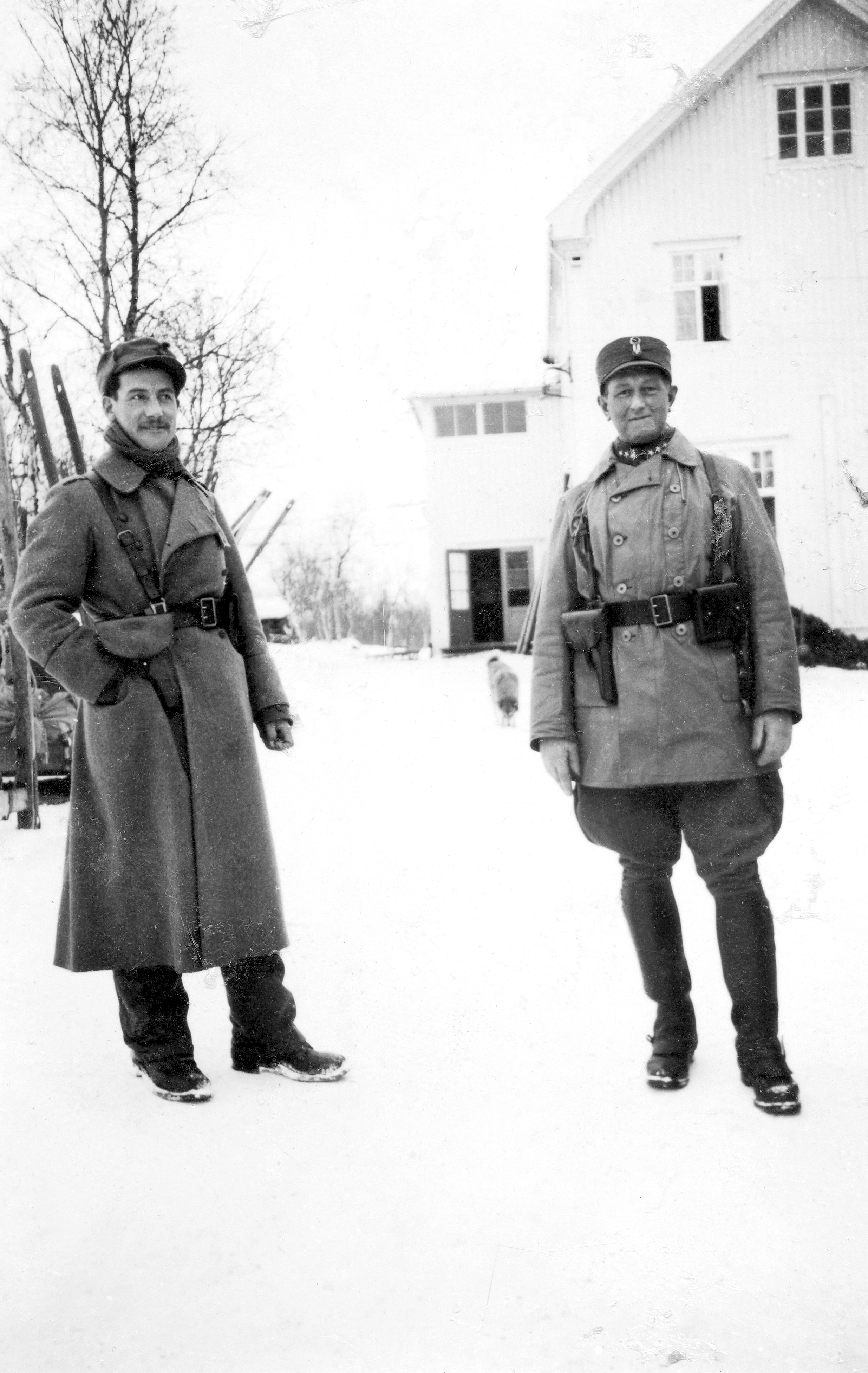 Fra Trygve B. Gjervans (1918 - 2004) samling. Gjervan var vernepliktig og tjenestegjorde ved Infanteriregiment 12 som holdt nøytralitetsvakt ved grensen til Sovjetunionen og Finland i Finnmark i 1940. Da tyskerne invaderte Norge 9. april ble IR 12 sendt sørover, og under general Carl Gustav Fleischer (1883 - 1942) ble de satt inn i det norske motangrepet ved Gratangen nær Narvik, hvor IR 12 led store tap. Fotograf er ifølge Gjervans notater hovedsakelig Kåre Hernes. Trygve Gjervans egen tekst til bildet: Til venstre sersjant Oddmund Morset, Selbu (skutt av tyskerne) og kompanisjefen Hilmar Mjøen. Sersjant Morset var sjef for Stabstroppen som jeg tilhørte.